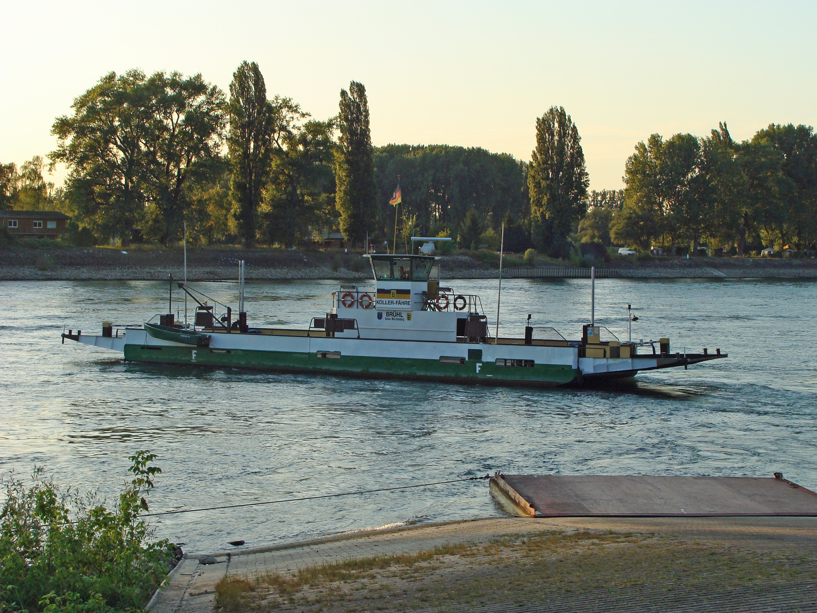 Deutschland: Kollerfähre über den Rhein bei der Gemeinde Brühl